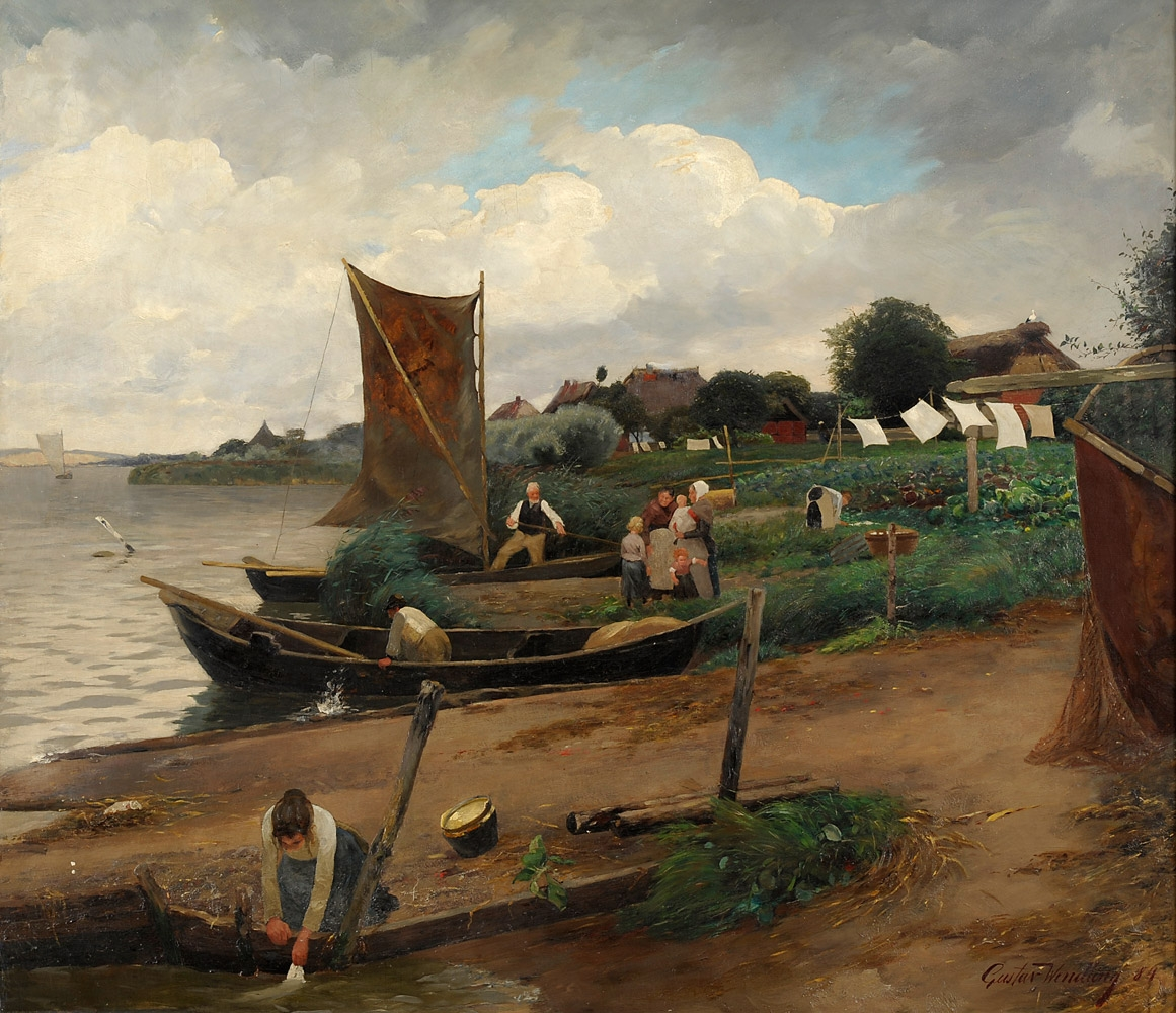 Fischerdorf Gothmund bei Lübeck. Signiert. Datiert (18) 84, Öl auf Leinwand, 118 x 137 cm